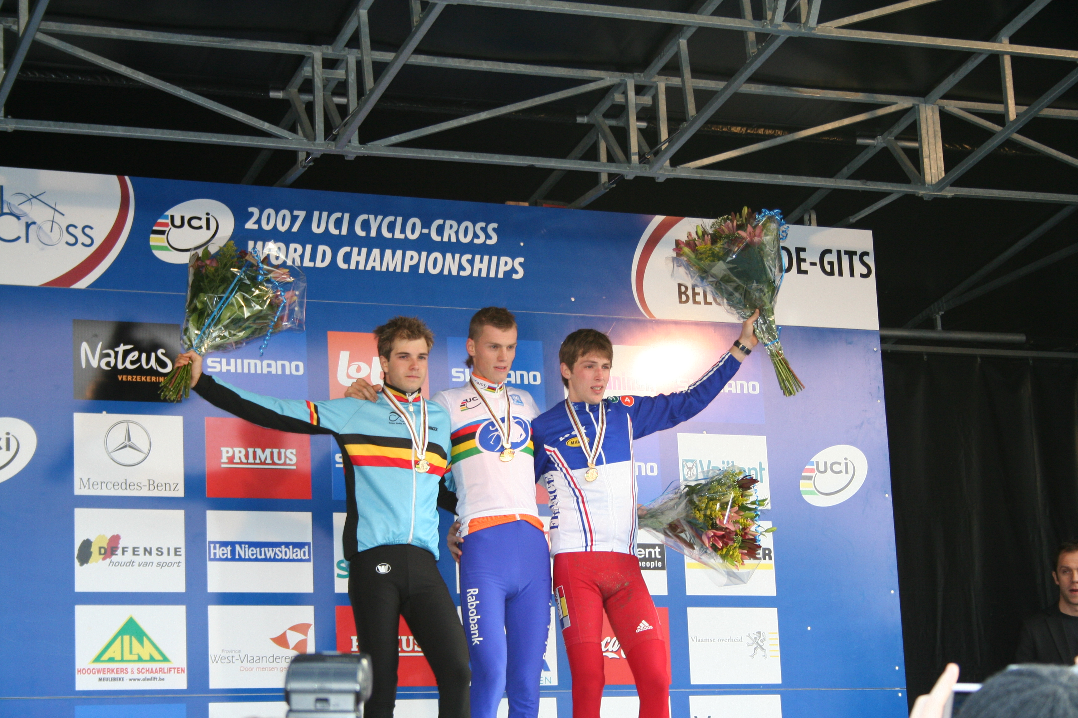 Podium Beloften WK Hooglede-Gits 2007